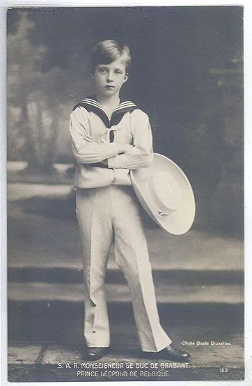 Leopoldo Duque de Brabante